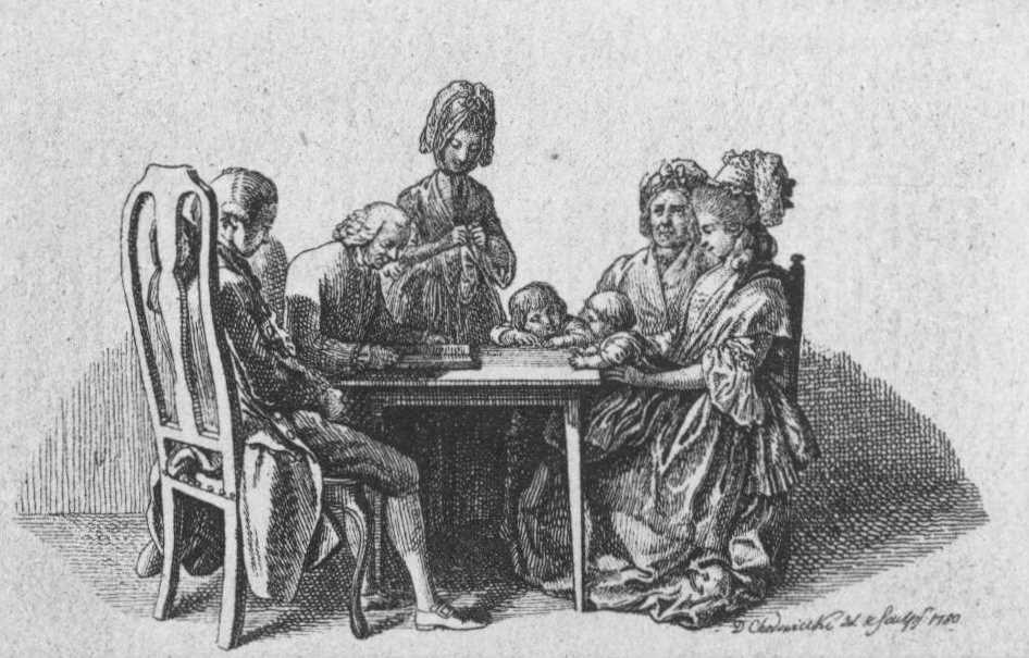 Titelvignette zu Cramers Unterhaltungen zur Beförderung der häuslichen Glückseligkeit. Ein Greis sitzt an einem Tisch und liest der darum versammelten Familie aus der Bibel vor. Das Bild stellt die Barez'sche Familie, Schwiegereltern des Künstlers, dar. (Beschreibung lt. Quelle)